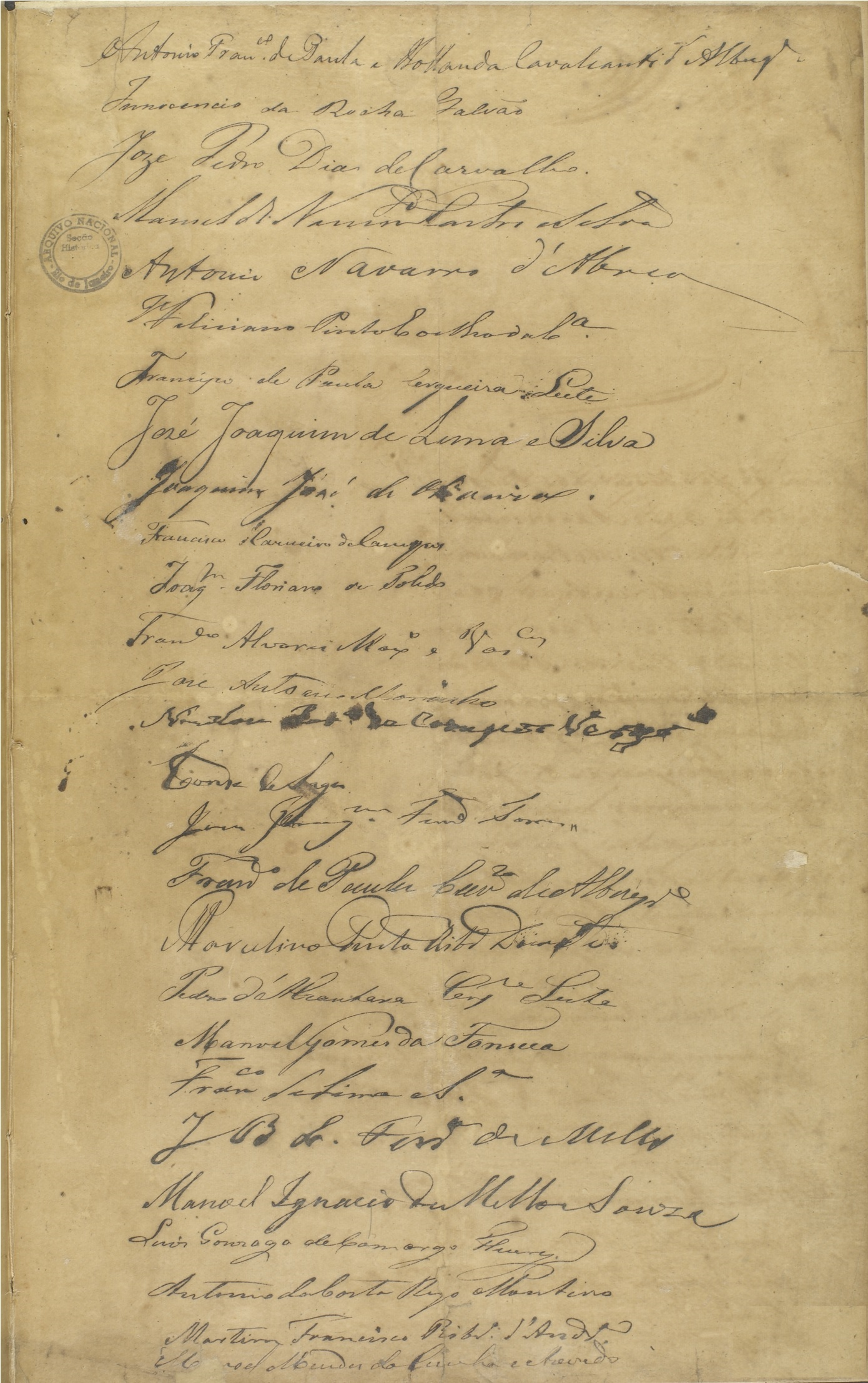 Fundo Diversos – SDH.